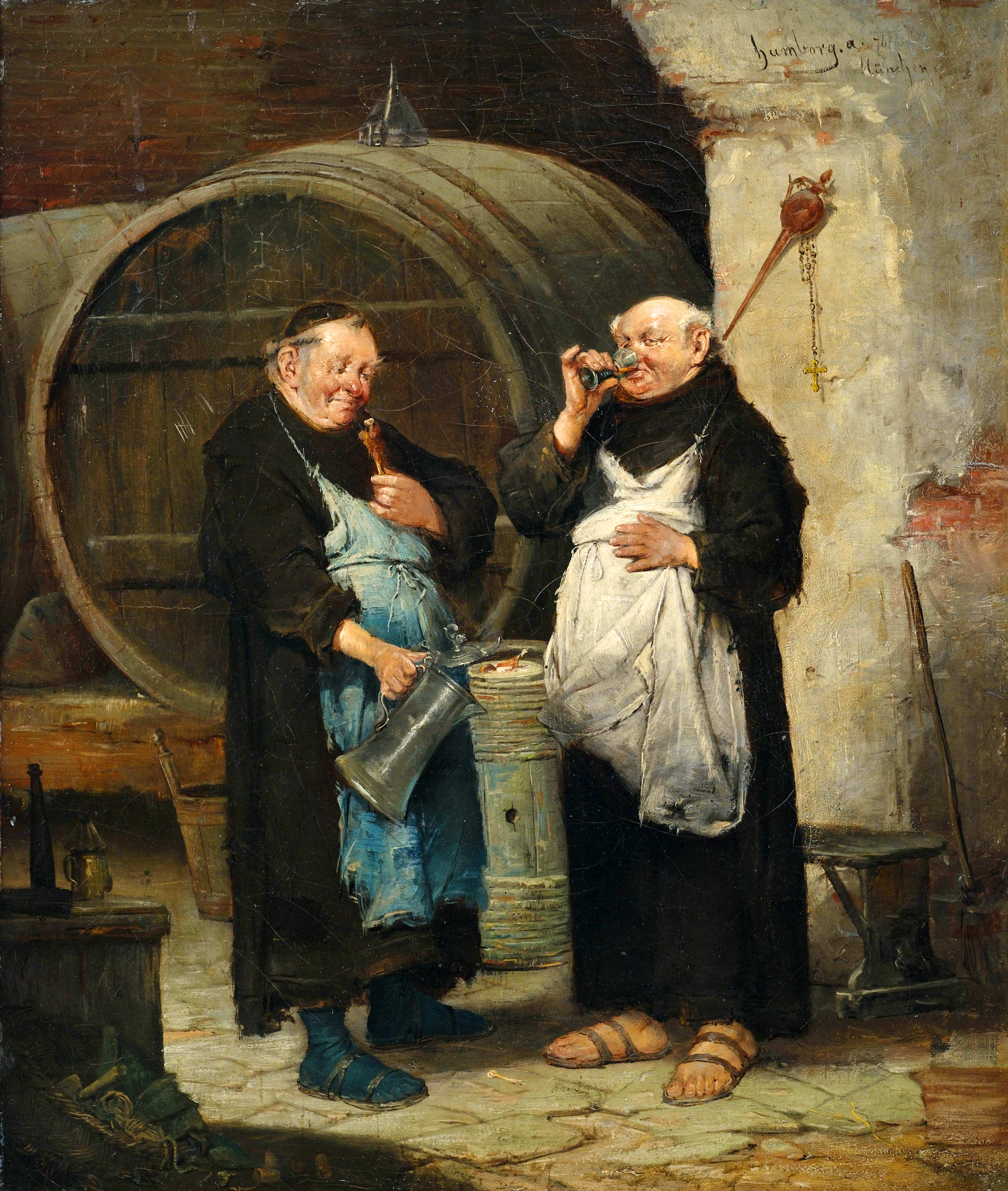 Zwei Mönche im Weinkeller.title QS:P1476,de:"Zwei Mönche im Weinkeller." label QS:Lde,"Zwei Mönche im Weinkeller."